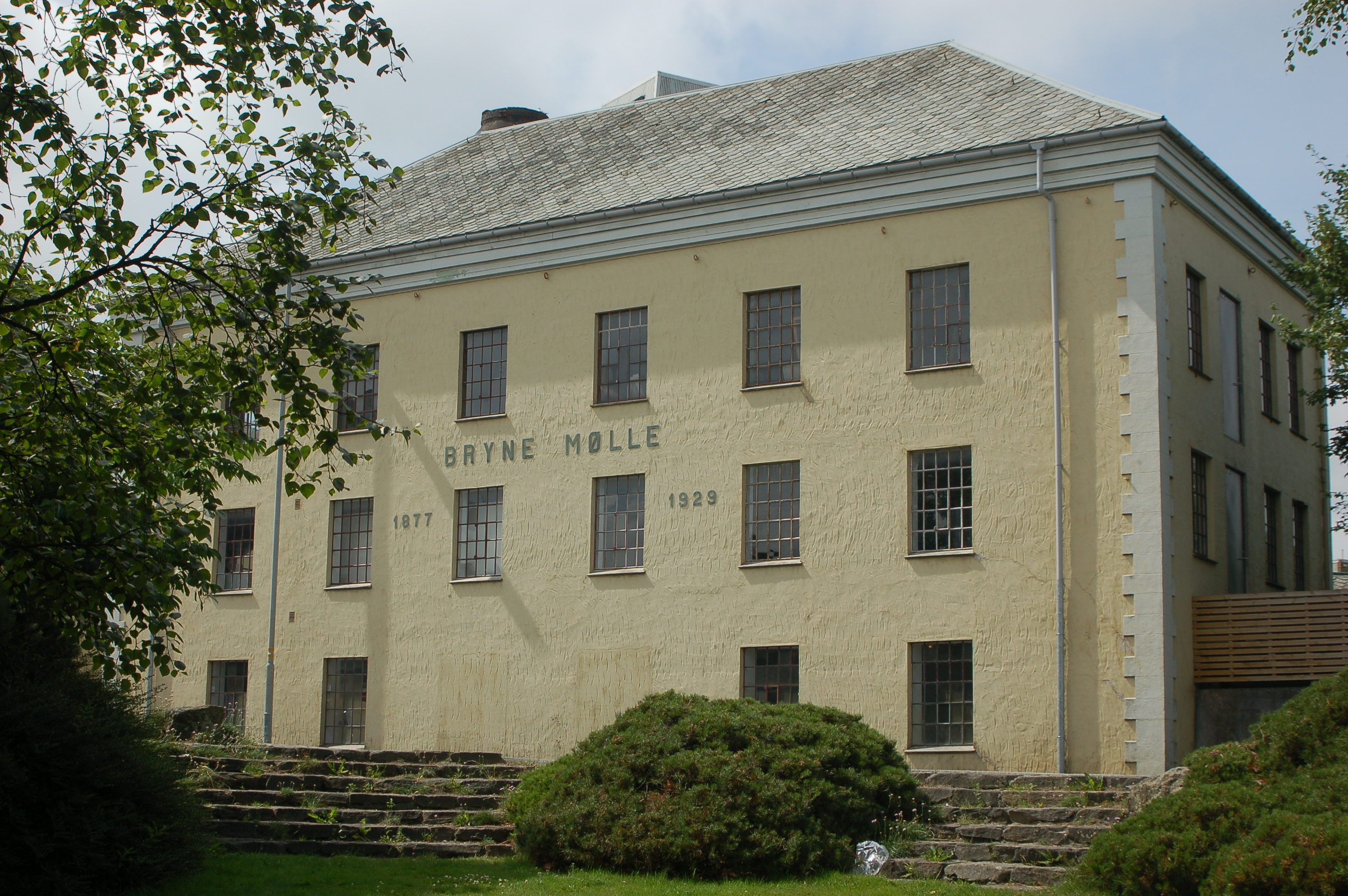 Bryne Mølle, Bryne, Rogaland, Norway